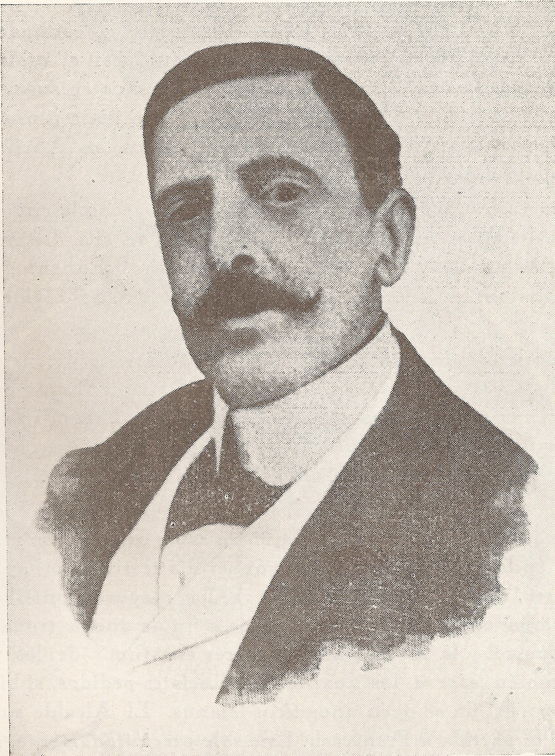 Imatge de l'escriptor reusenc Francesc Gras i Elies